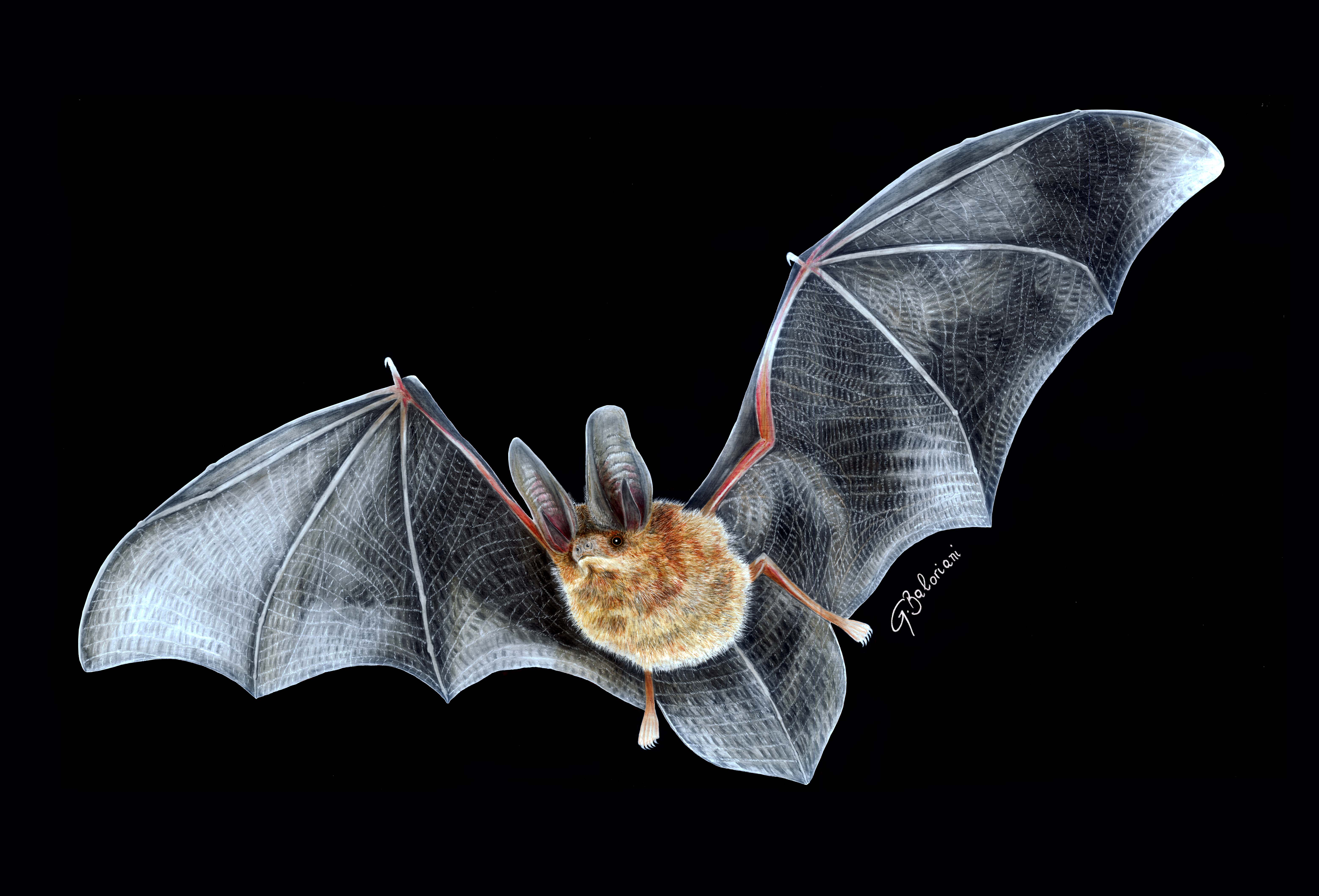 Histiotus montanus, Philippi y Landbeck, 1861, murciélago orejudo menor o murciélago orejudo chico, es un pequeño murciélago perteneciente a la familia Vespertilionidos, de amplia distribución en Sudamérica. Su característica más conspicua es el profuso desarrollo de sus orejas. Posee una longitud de 11 cm y una envergadura alar de unos 29 cm, la cola se encuentra incluida totalmente en el urupatagio. Se encuentra en numerosos tipos de ambientes; suele refugiarse en viviendas, cuevas y huecos de árboles. De hábitos nocturnos, se alimenta de insectos a los cuales captura en vuelo. Se trata de una especie rara sobre la cual se conoce muy poco.